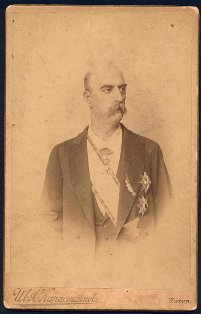 Панайот Славков